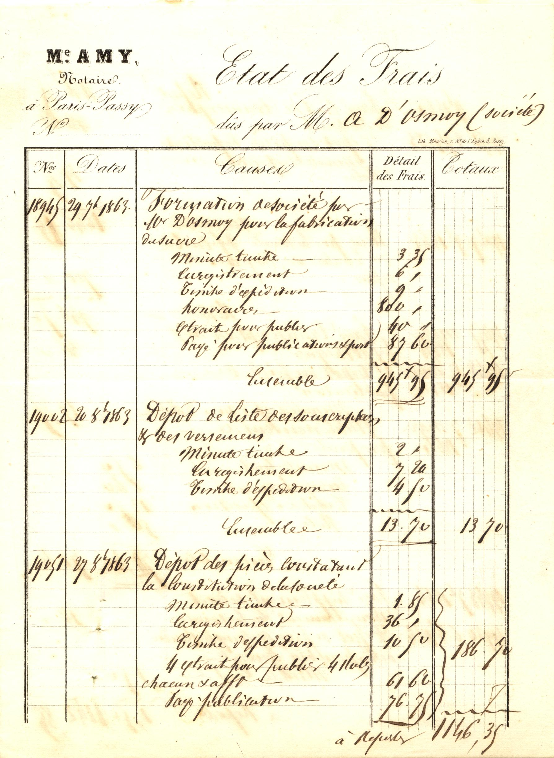 Frais pour les minutes chez Me Charles Victor Amy, notaire de la société A. d'Osmoy & Cie.